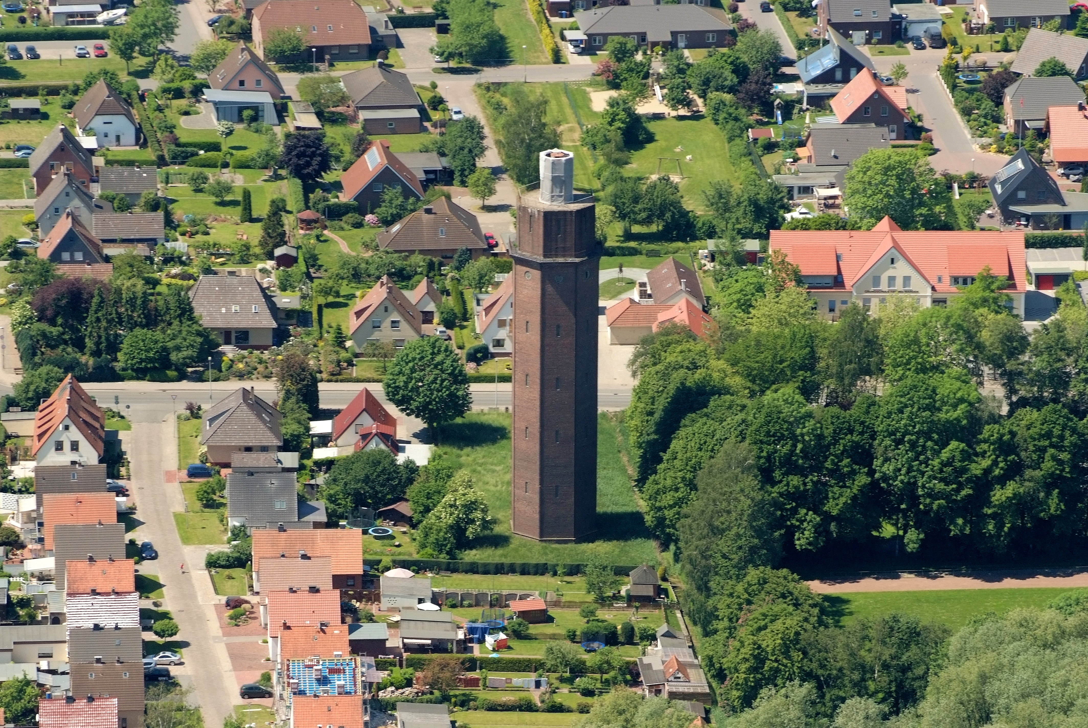 Wasserturm Kirchhammelwarden, Brake (Unterweser) Fotoflug vom Flugplatz Nordholz-Spieka über Cuxhaven und Wilhelmshaven